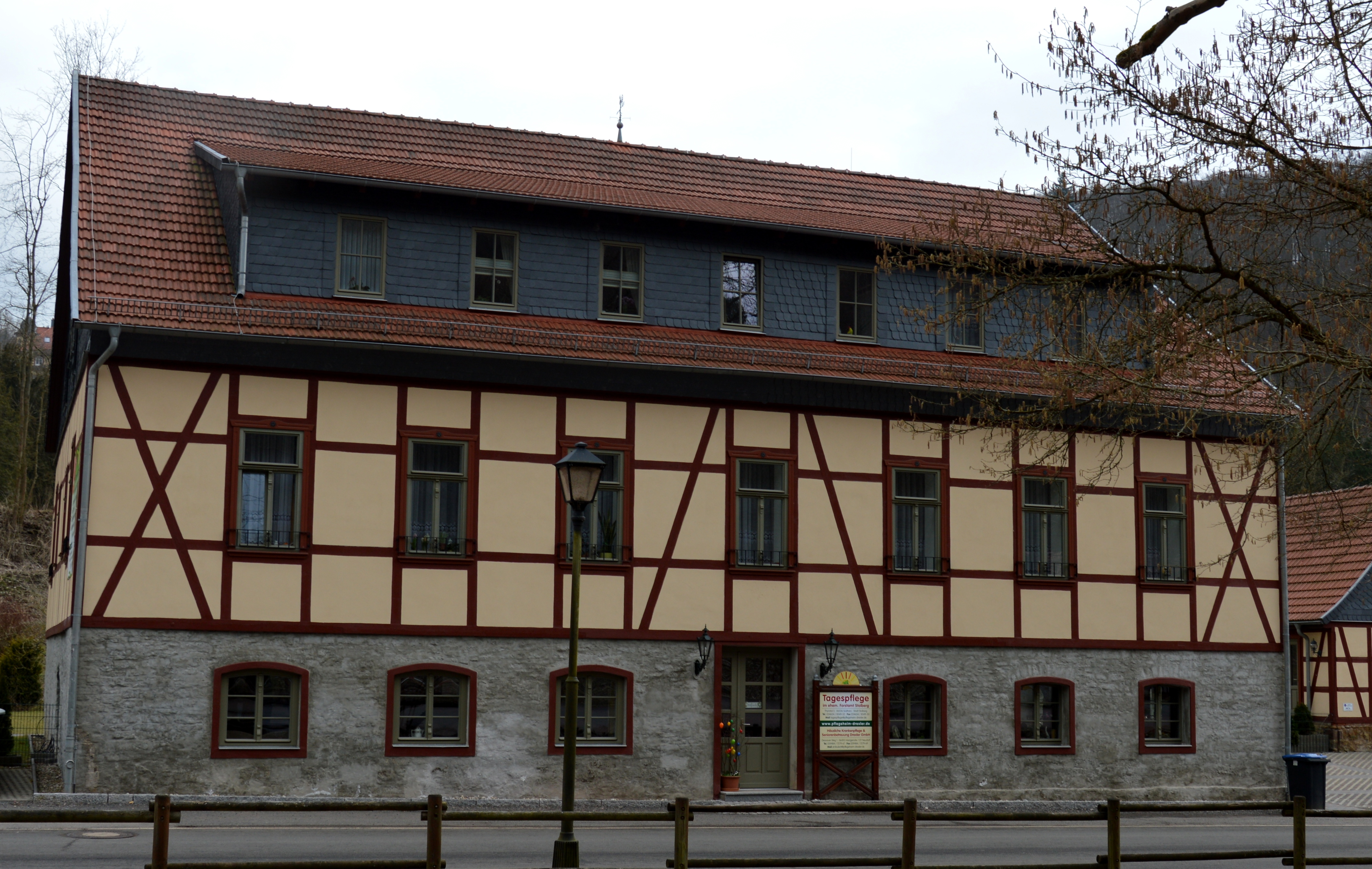 Haus Thyratal 5